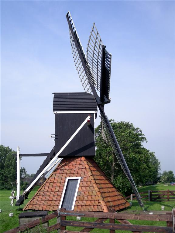 Heechhiem, molen in Goengahuizen